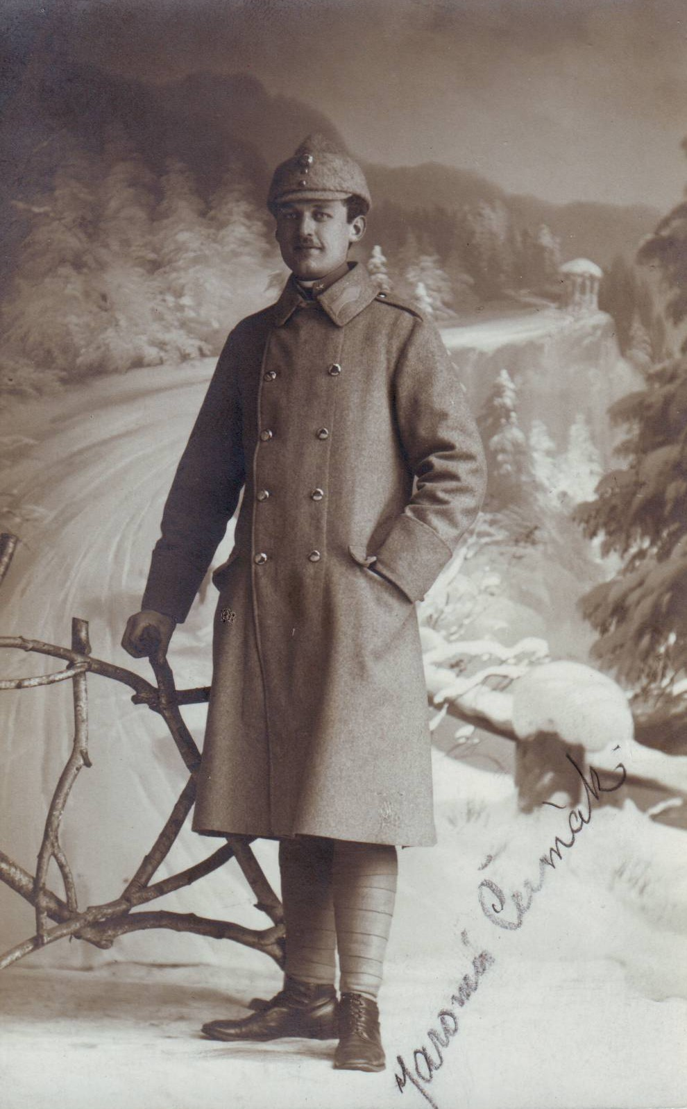 ak. sochař Jaromír Čermák (kol.r.1916)